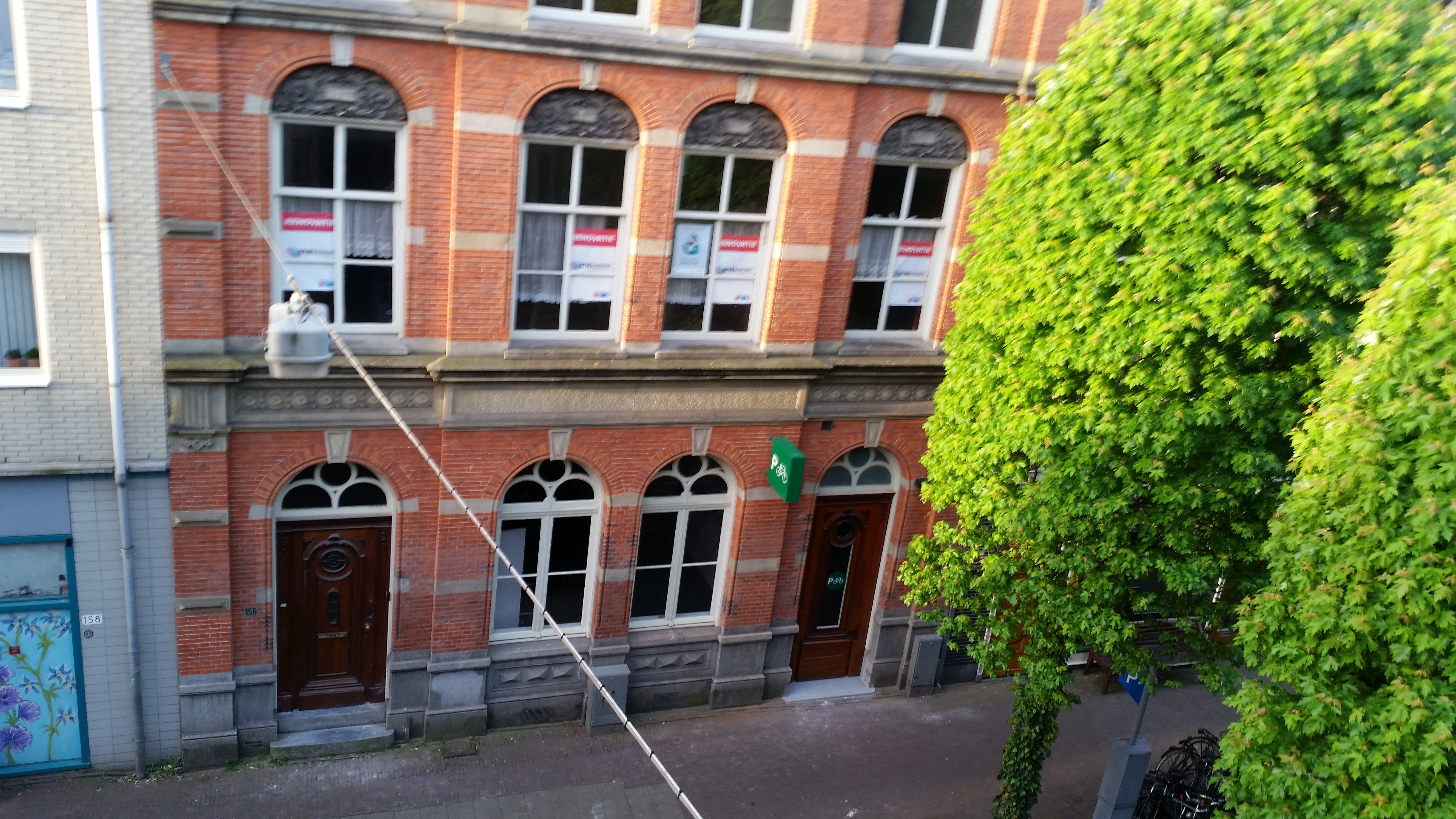 Gerard Doustraat 156, Amsterdam, in 2018 omgebouwd tot fietsenstalling